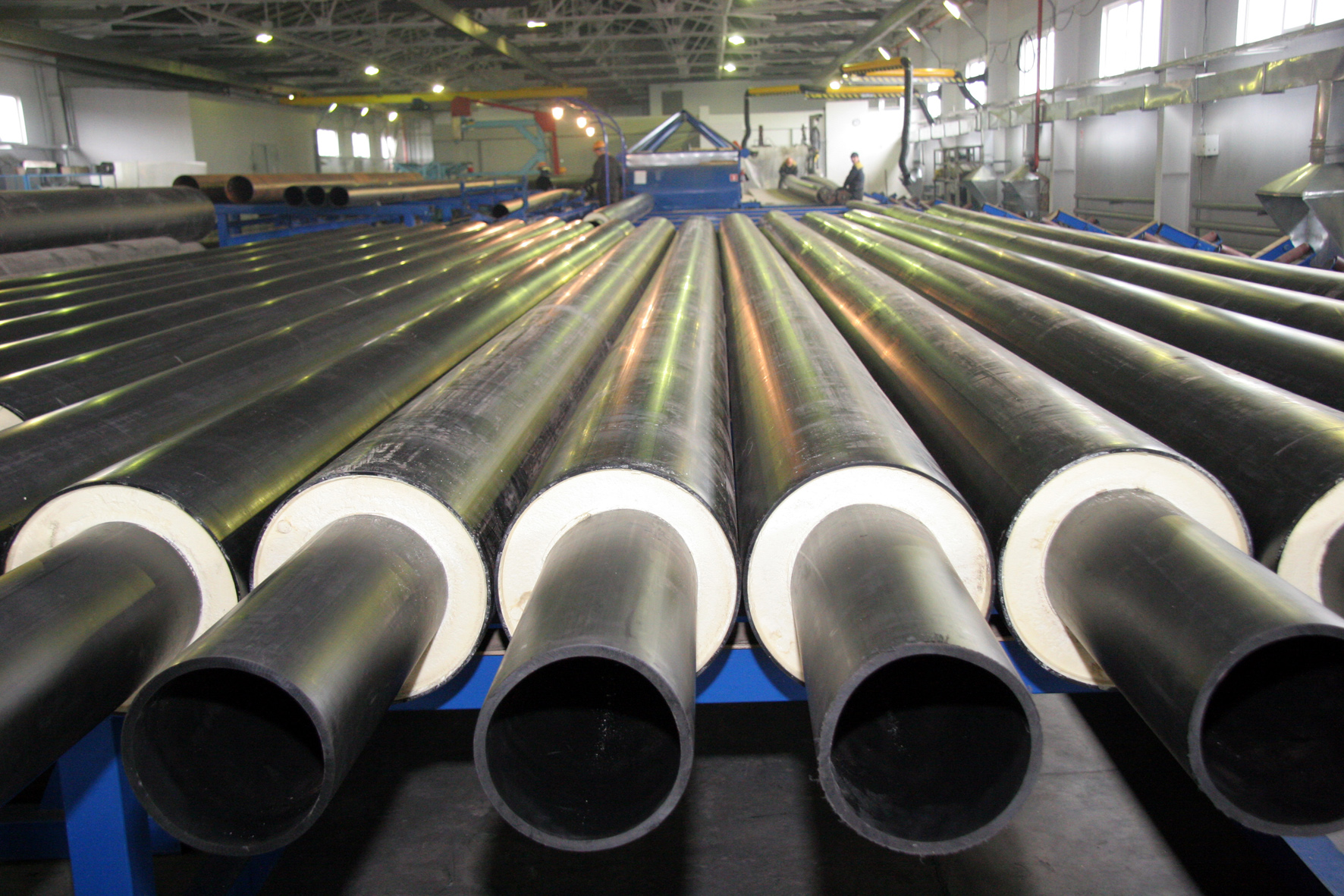 Производство теплоизолированных труб АРКТИК